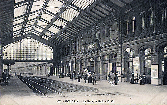 Gare de Roubaix, la grande halle qui couvre les voies et quais, au début des années 1900 (elle est détruite en 1914).